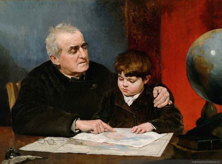 Primer cuadro original que Valenzuela Puelma envió al Gobierno de Chile desde París. Fue presentada en el Salón Nacional de 1884 junto con Flores del jardín y La Ciencia mostrando al Genio que solo ella conduce a la inmortalidad, ganando la primera medalla.